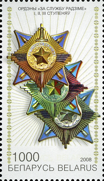 № 743. Ордена «За службу Родине» I, II, III степеней